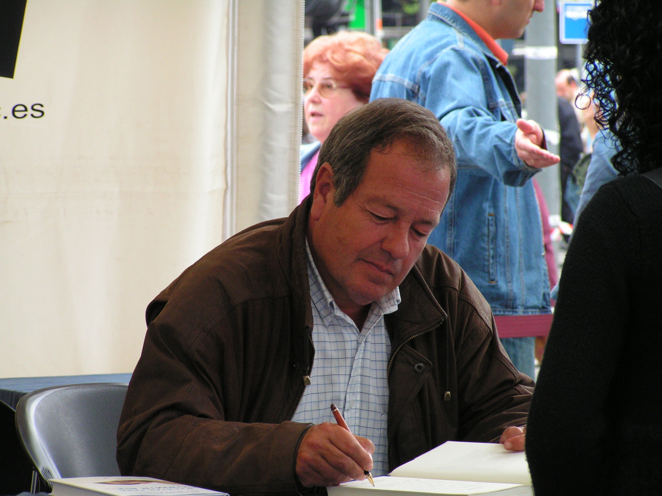 José María Mendiluce signant llibres per Sant Jordi a Barcelona el 2006